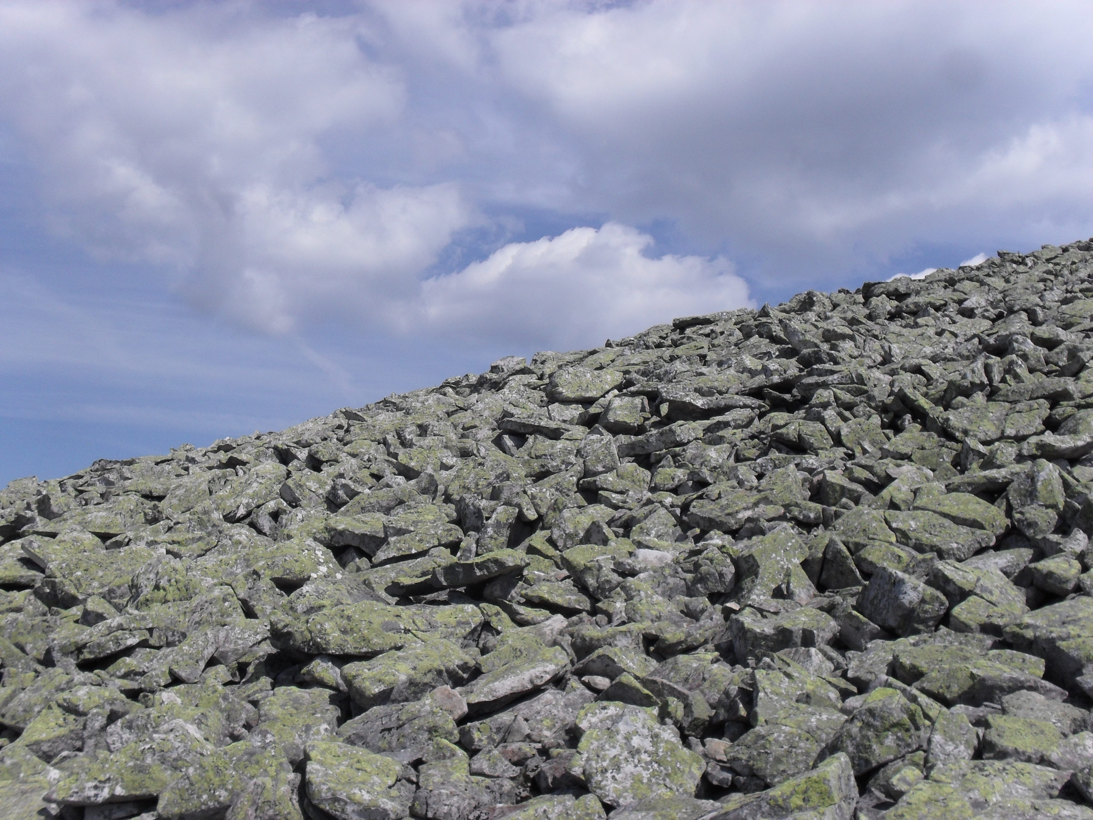 Fotografie pořízená na Luzném.